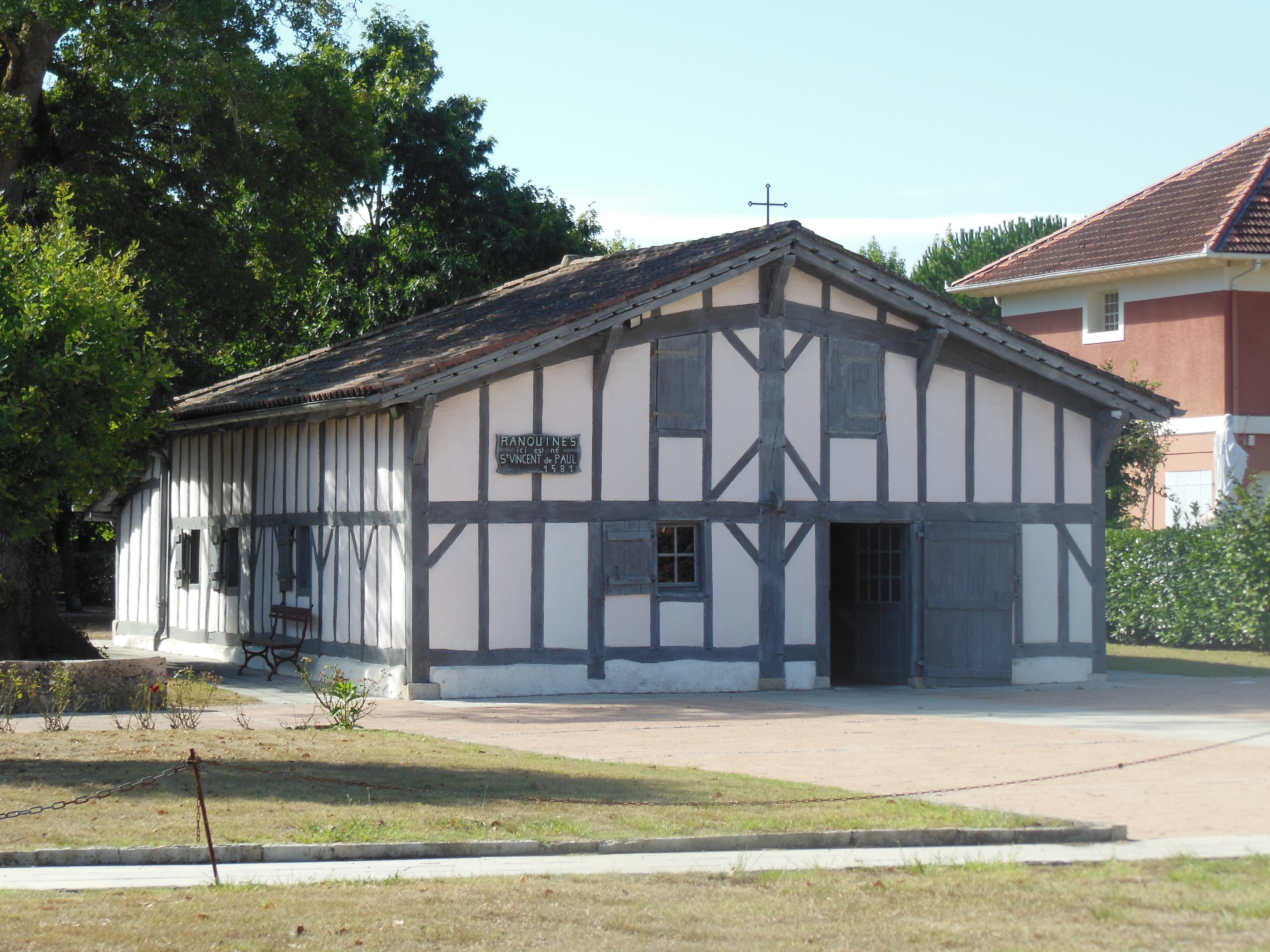 Ranquines, maison natale de Vincent de Paul (commune de Saint-Vincent-de-Paul, Landes, France)